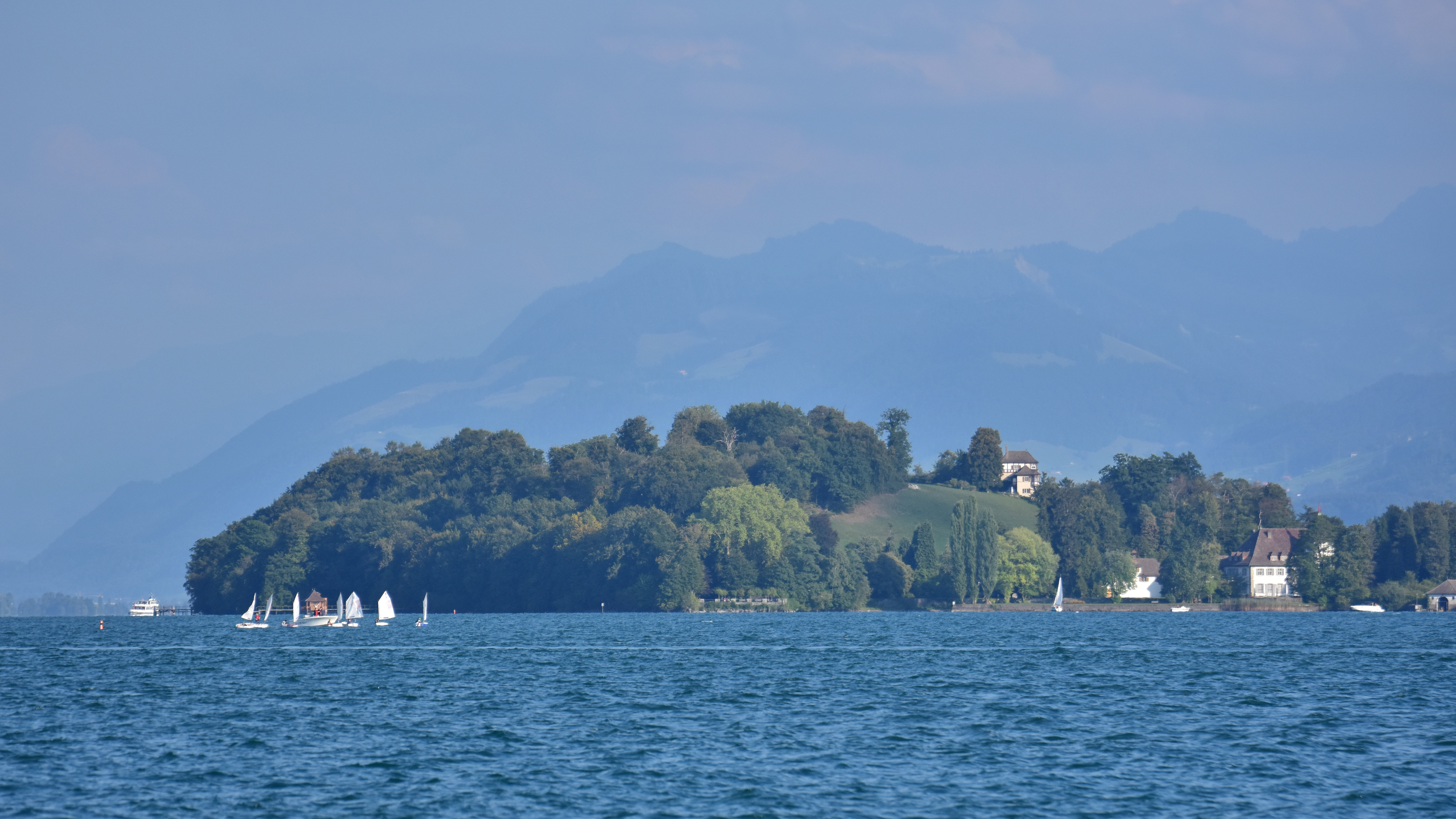 Au peninsula in Au as seen from Zürichsee-Schiffahrtsgesellschaft (ZSG) ship MS Helvetia on Zürichsee in Switzerland